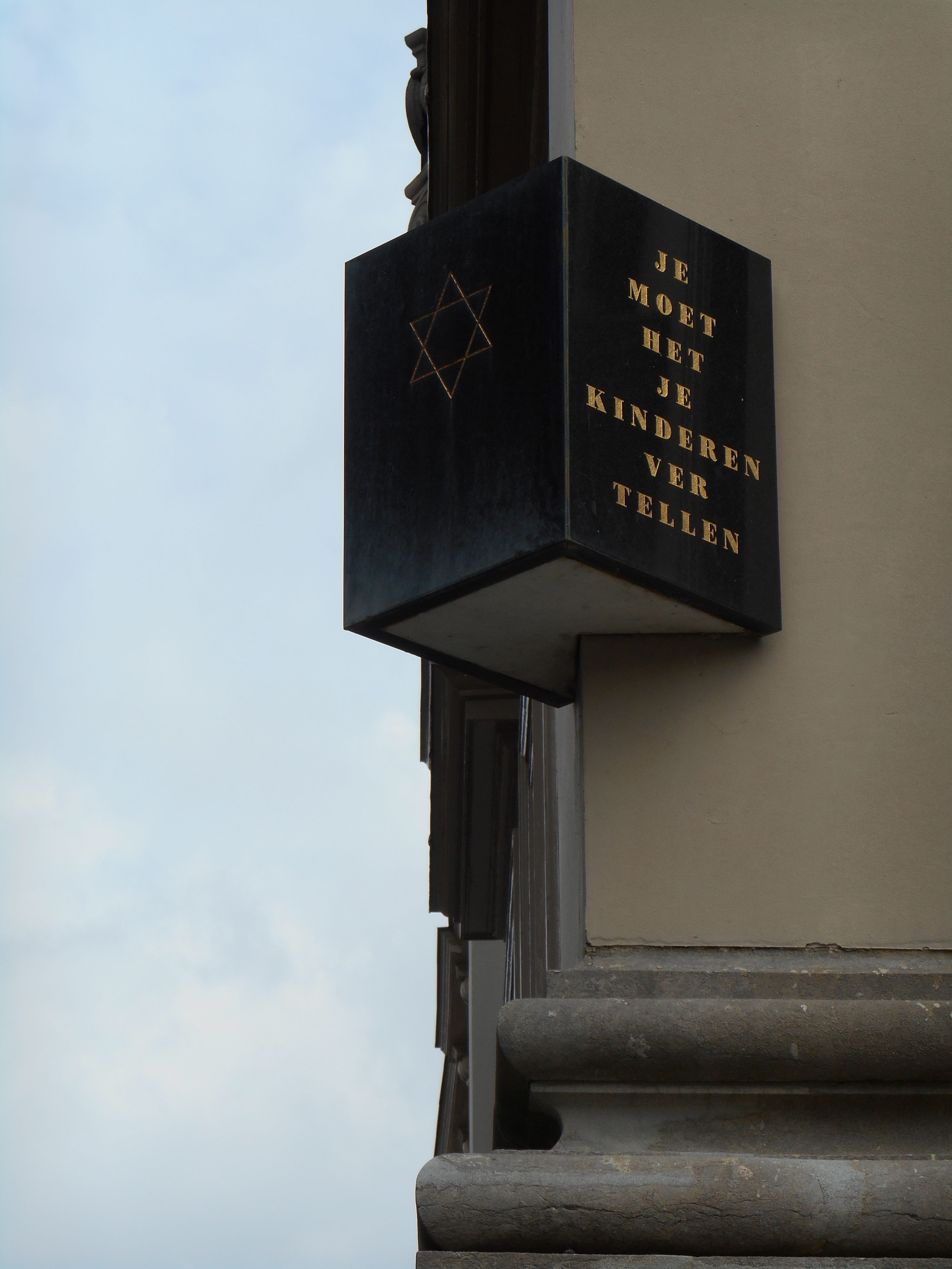 Gedenksteen in de gevel van het Stadhuis van Dordrecht